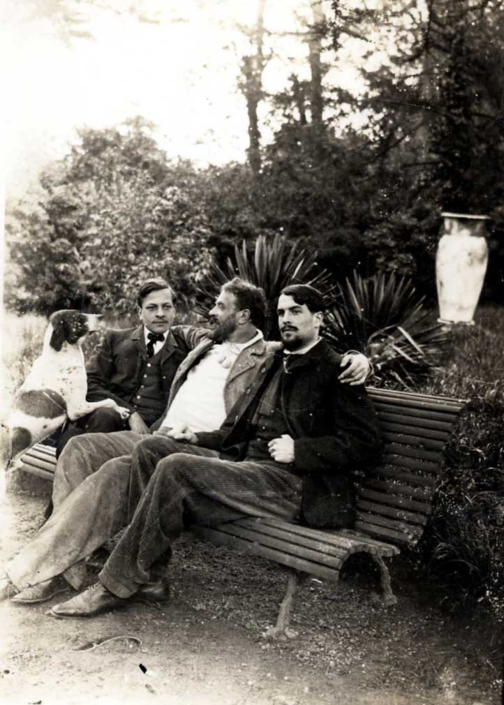 Lachenal père et fils de gauche à droite Raoul,Edmond,Jacques